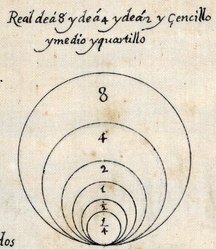 Tamaños relativos del "Real de á 8 y de á 4 y de á 2 y çencillo y medio y quartillo". Detalle del informe titulado Medidas antiguas y modernas que se an usado en tienpo de los Señores Reyes Catolicos en los Repartimientos de las aguas de los Caños de Carmona desta Ciudad de Sevilla y de sus anteceseros como fue el Sor. Rei Dn. Juan de esclarecida memoria, realizado en 1657 por Sebastián de Ruesta a petición de Juan Francisco Nabarrete y dedicado a Juan de Góngora.